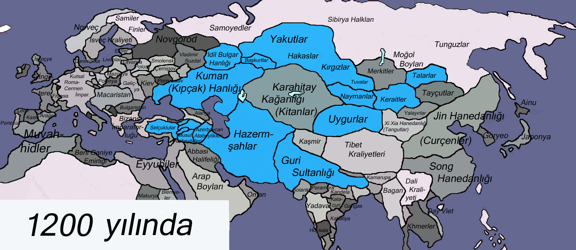 Kaynak: Haritanın büyük bir kısmı Thomas Lessmann'nin izini ile kendi ürettiği Tarihi dünya haritaları'ndan alınmıştır. Ayrıca Jean-Paul Roux'un Türklerin Tarihi (ISBN 975-997-091-0) adlı kitabındaki tariflerine göre ve Büyük Tarih Atlası (Arkın Kitabevi ISBN 975-402-012-4) ile bazı düzeltmeler ve ilaveler yapılmıştır.